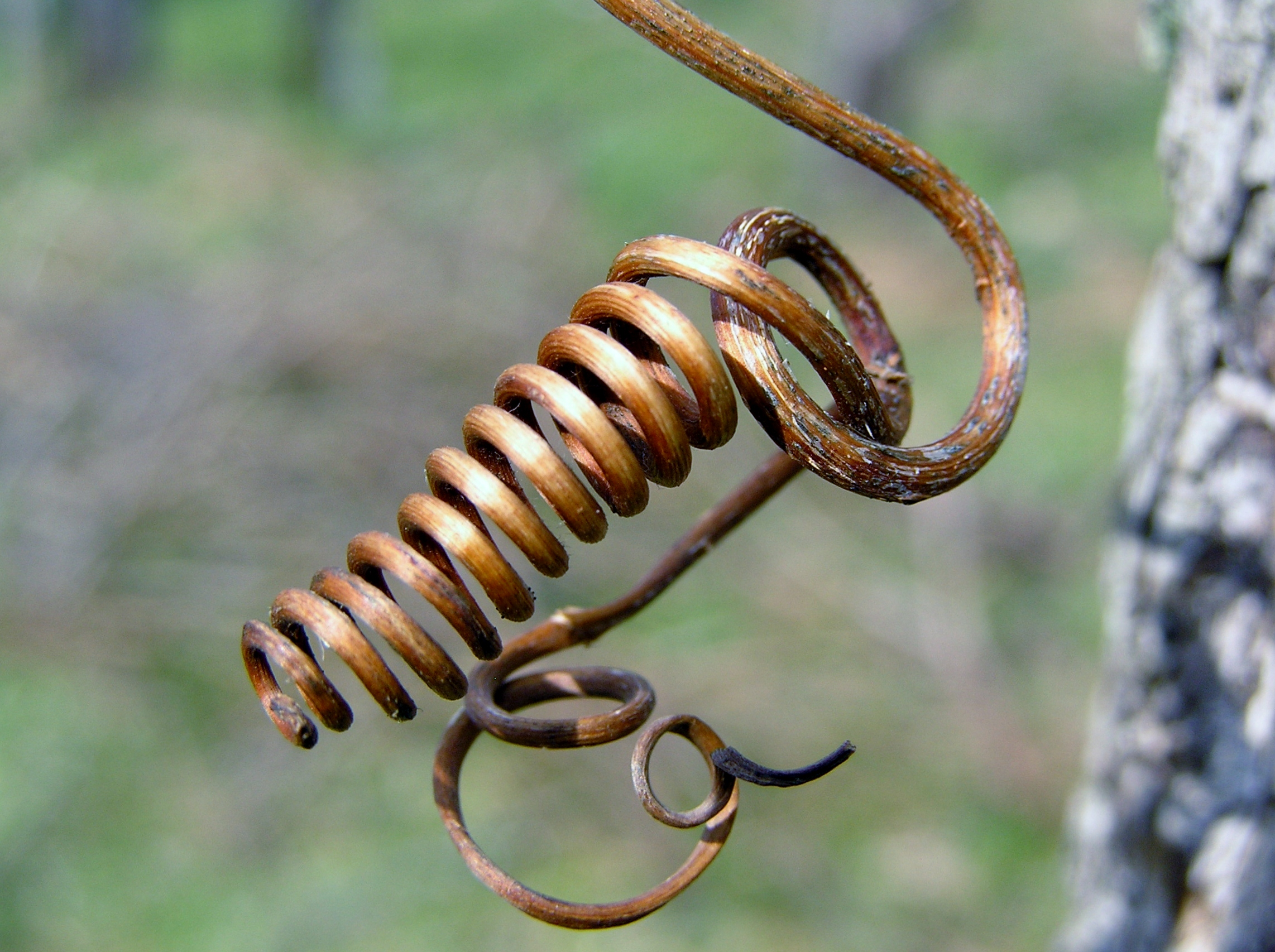 Posnetek olesenele vitice trte Refošk, ki na Krasu rodi Kraški teran.